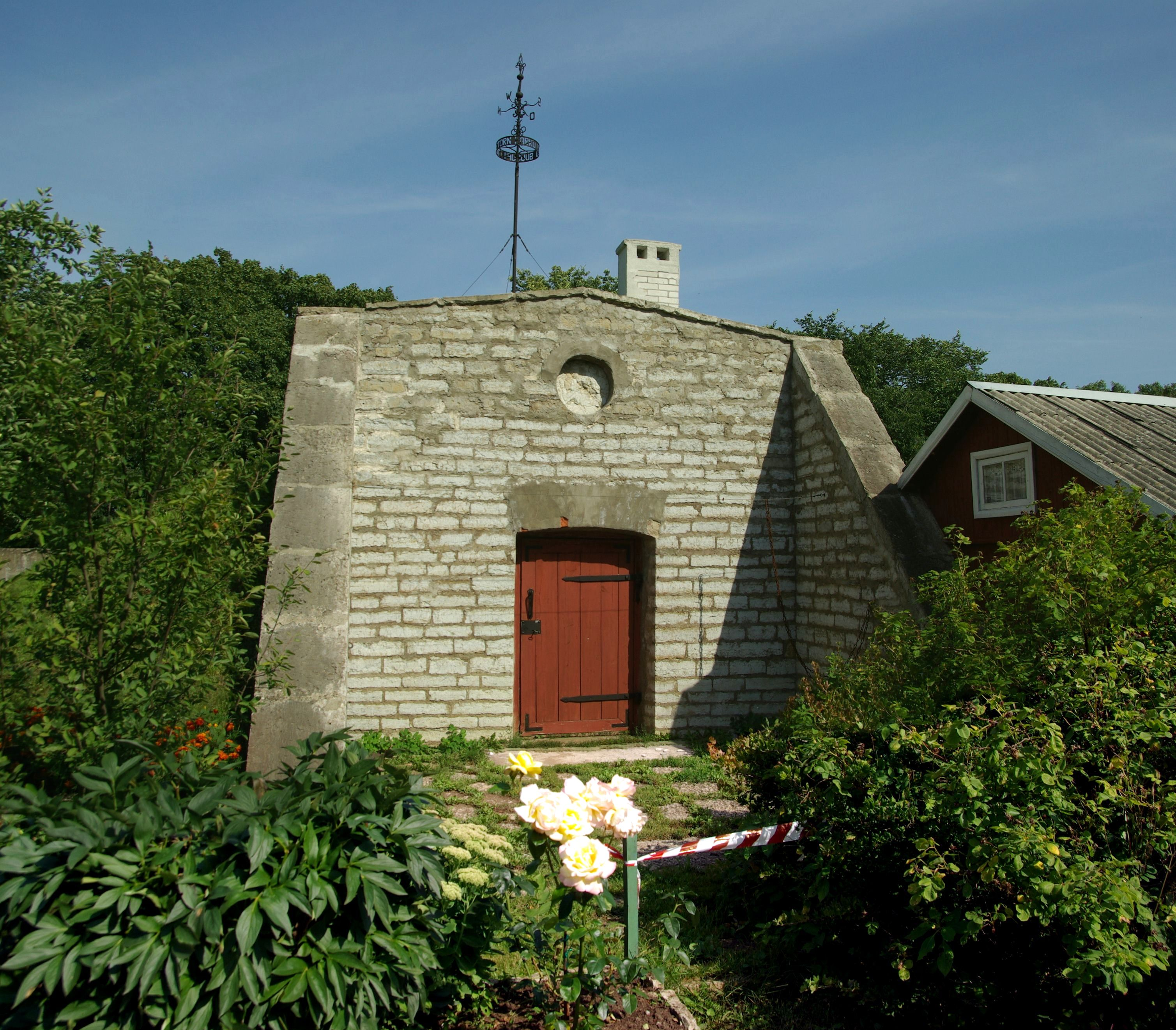 Harju maakond, Harku vald, Suurupi küla